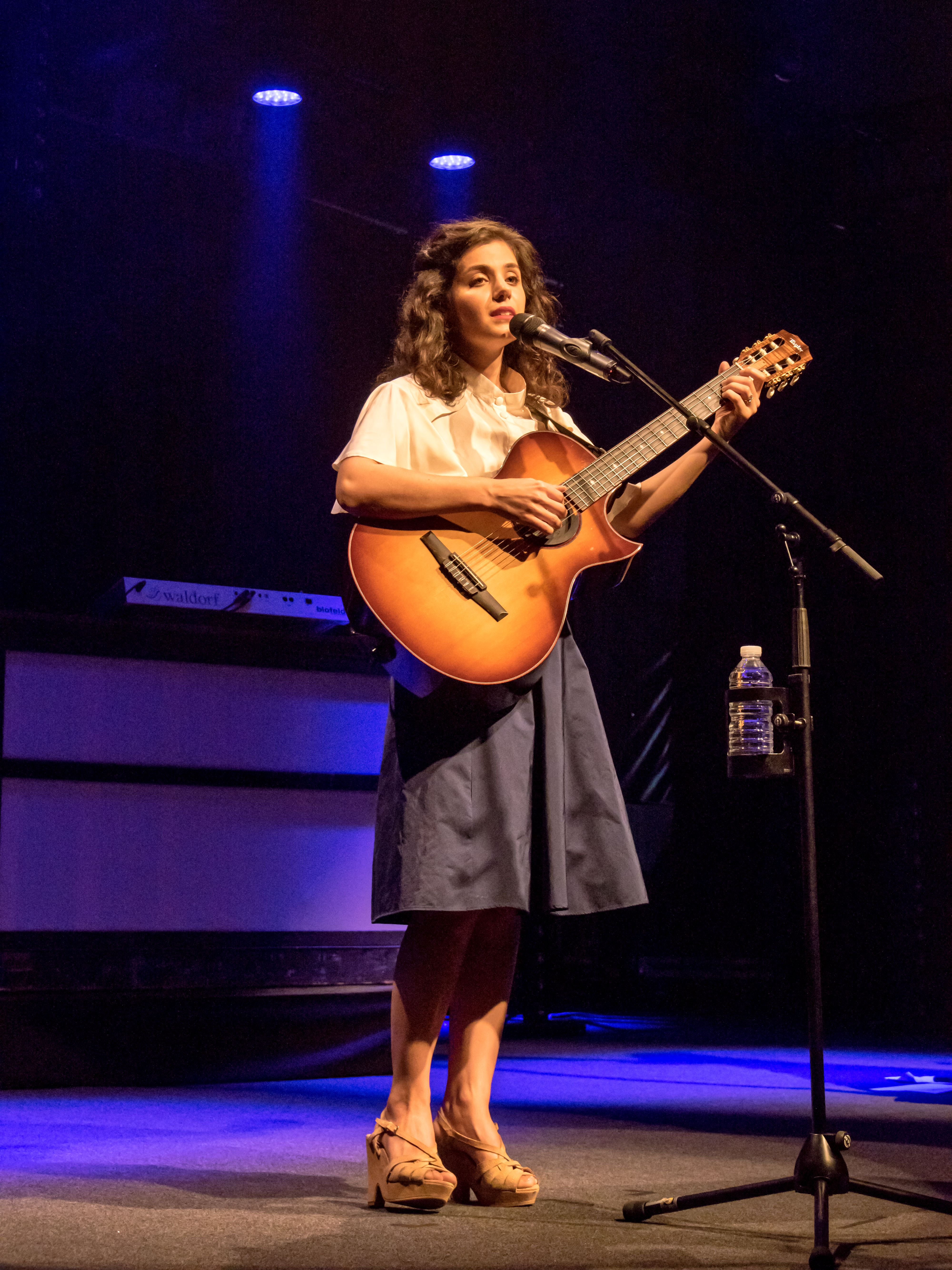 Bilder vom Zelt Musik Festival 2016 in Freiburg im Breisgau Katie Melua